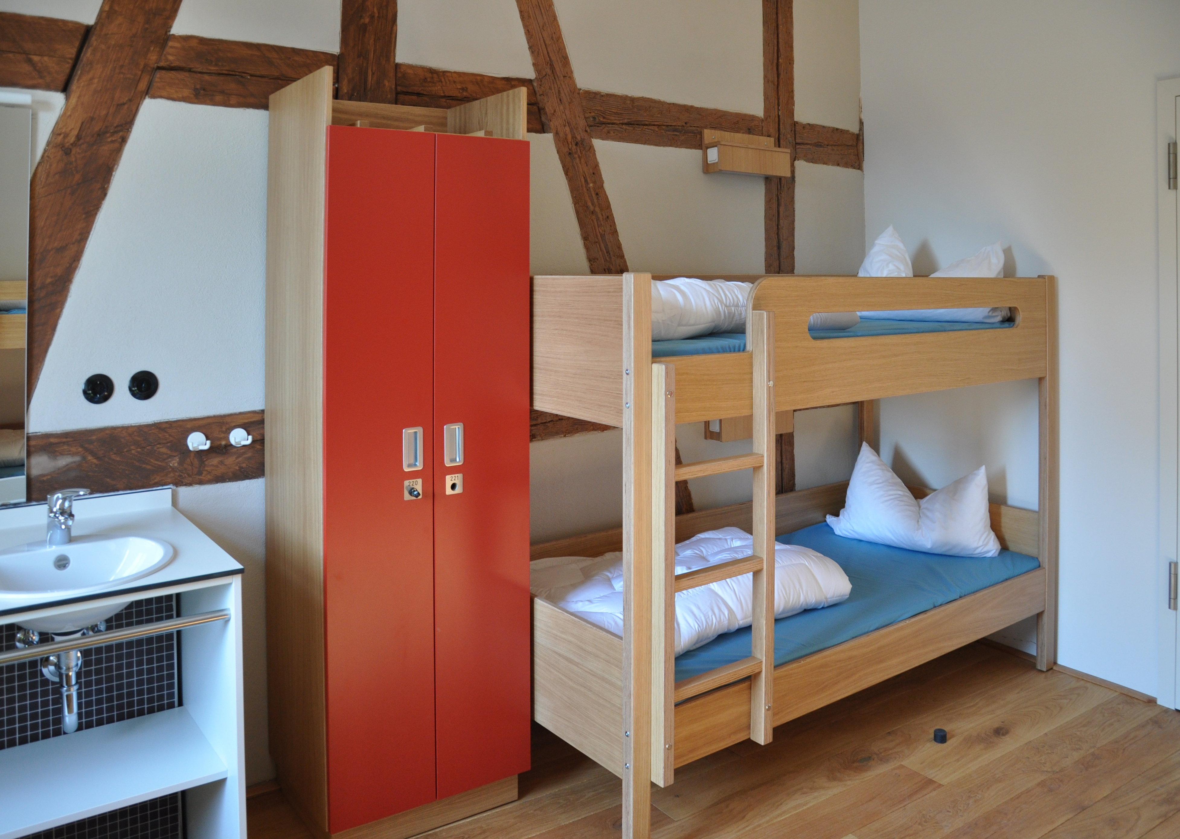 Ravensburg, Veitsburg, Jugendherberge am Tag der Neueröffnung am 3. März 2012